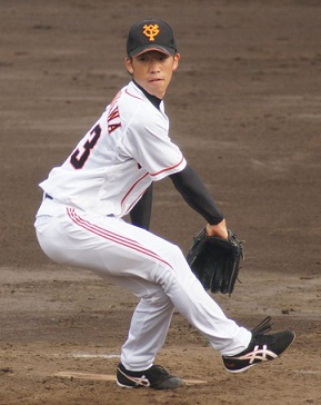 Giants_hurukawa